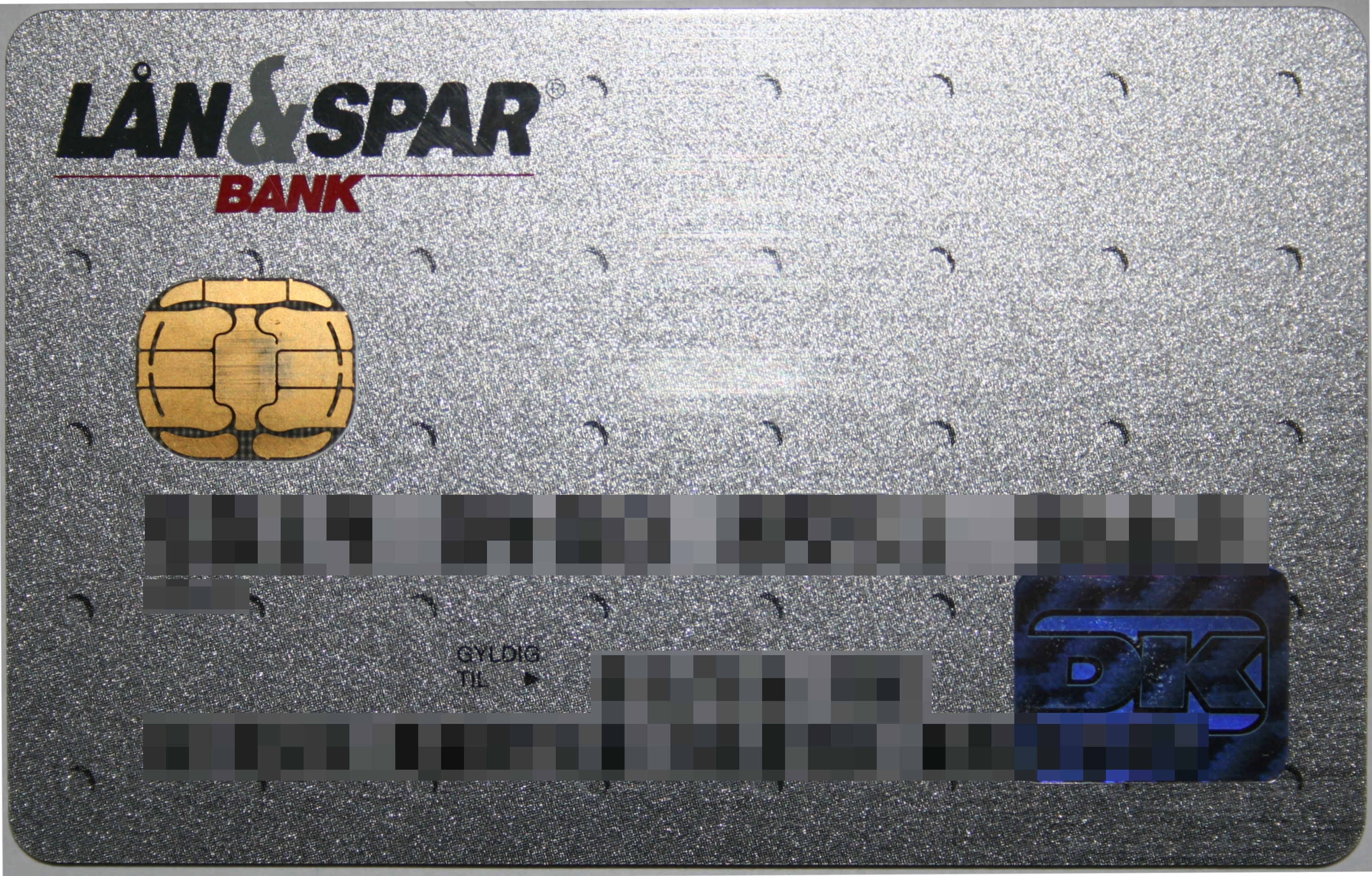 Billede af dankort fra Lån & Spar bank